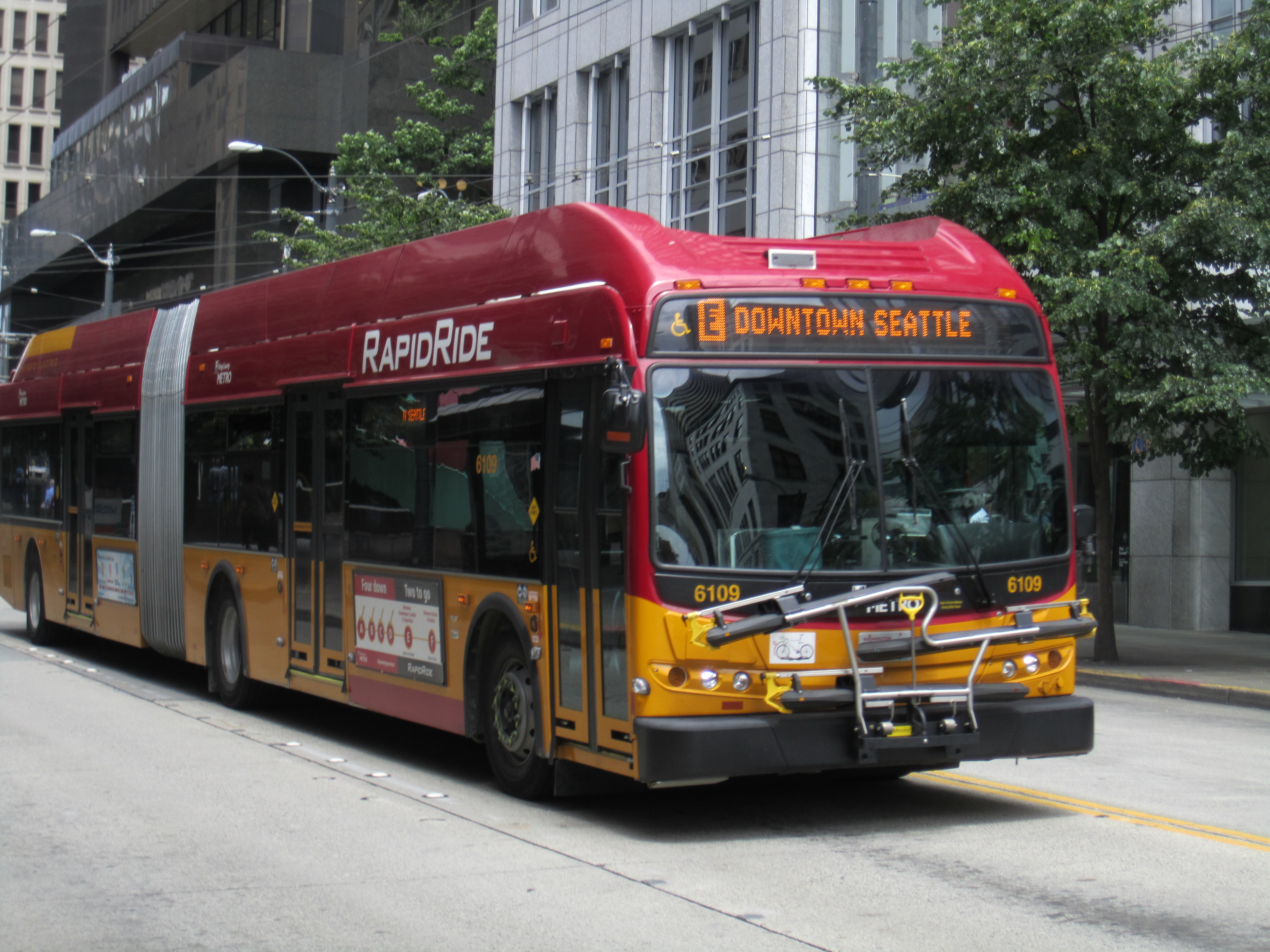 RapidRide E on 3rd Avenue